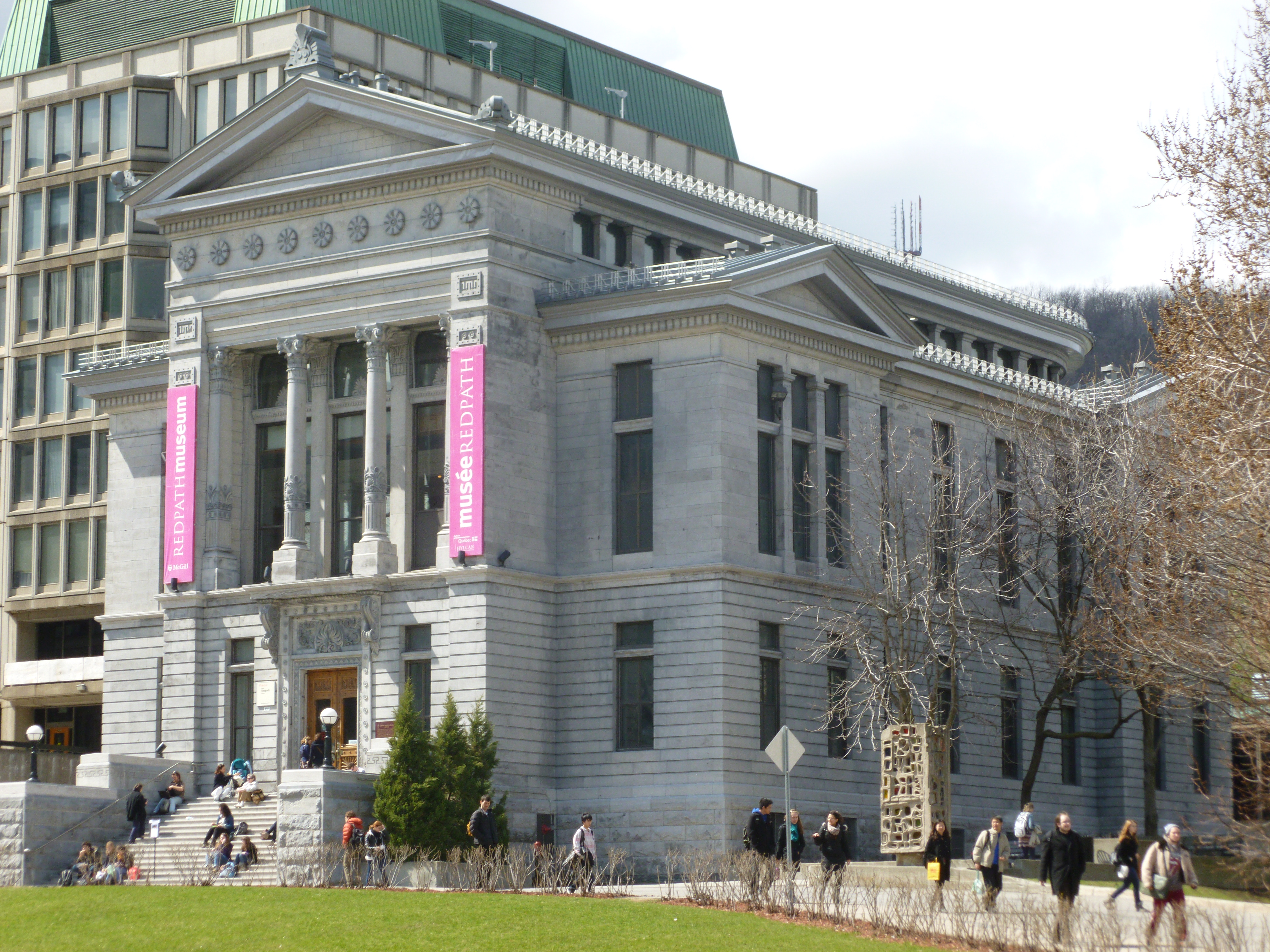 Le musée Redpath à Montréal, Québec Canada